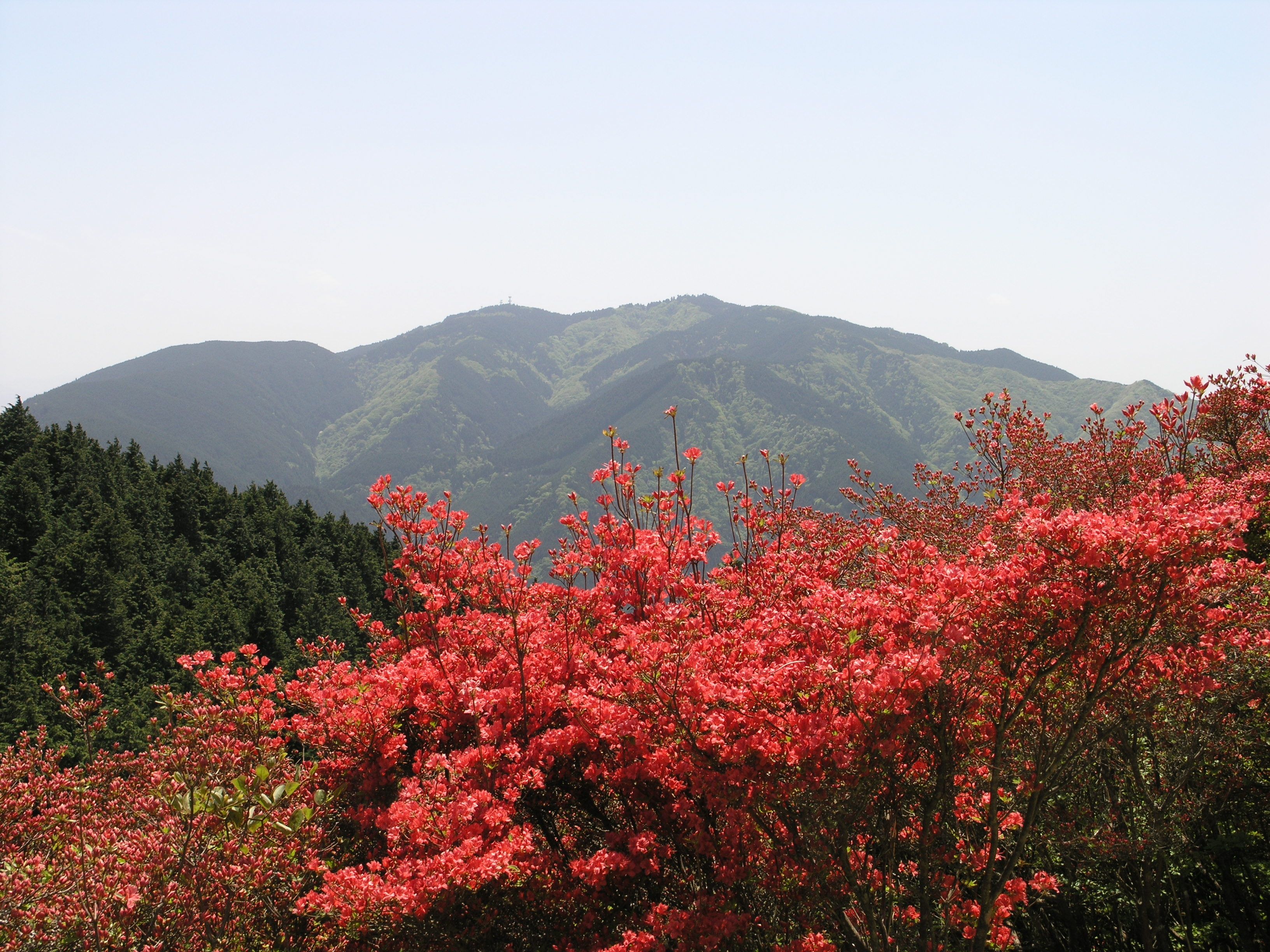 大和葛城山から撮影した金剛山（奈良県御所市）